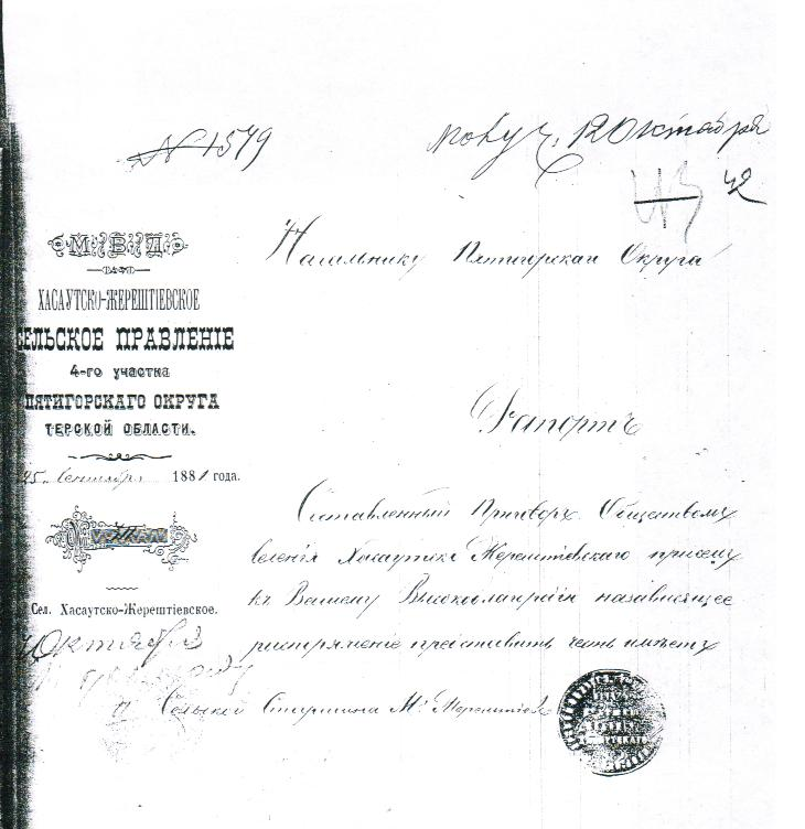 Рапорт Магомеда Жерештиевы Начальнику Пятигорского округа.